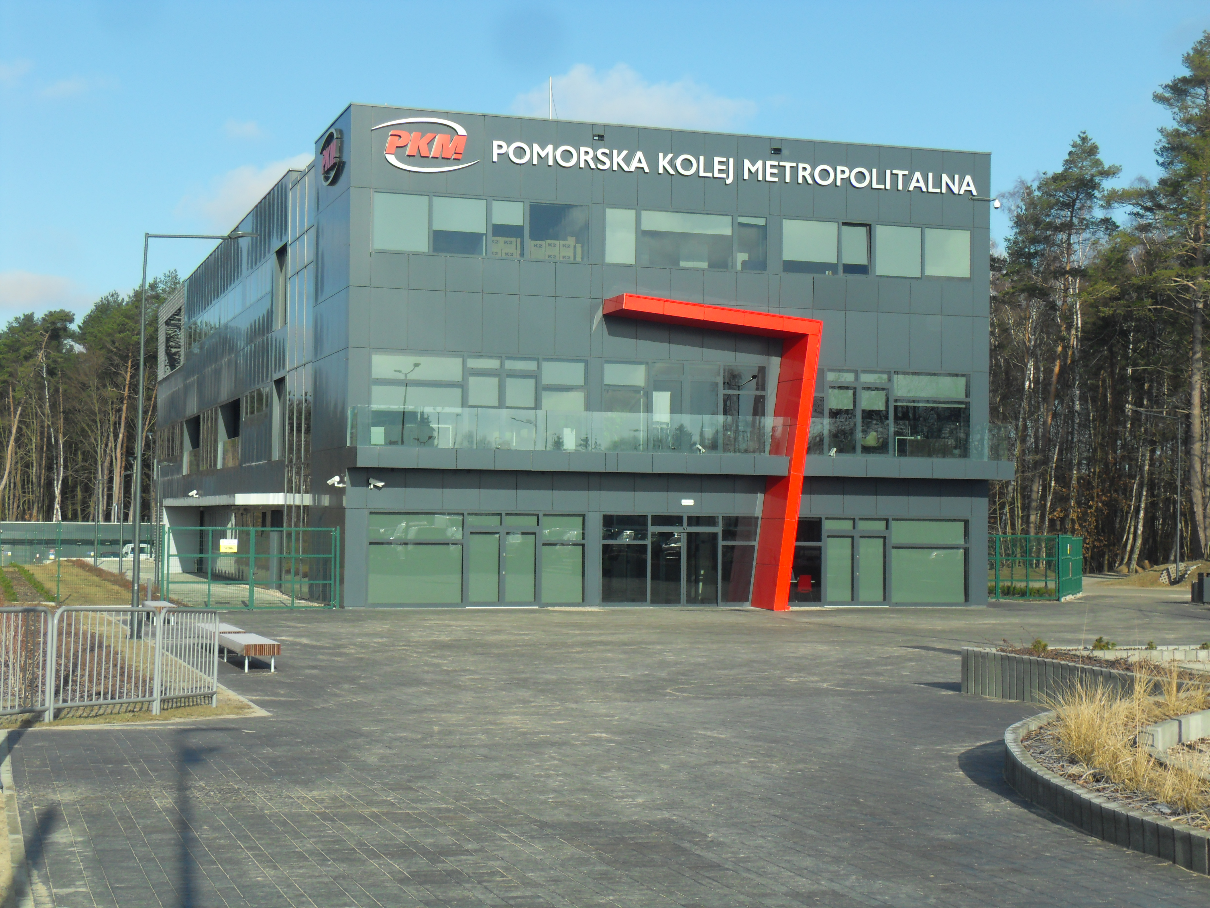 Gdańsk Matarnia, ul. Budowlanych 77. Lokalne Centrum Sterowania Pomorskiej Kolei Metropolitalnej (PKM).